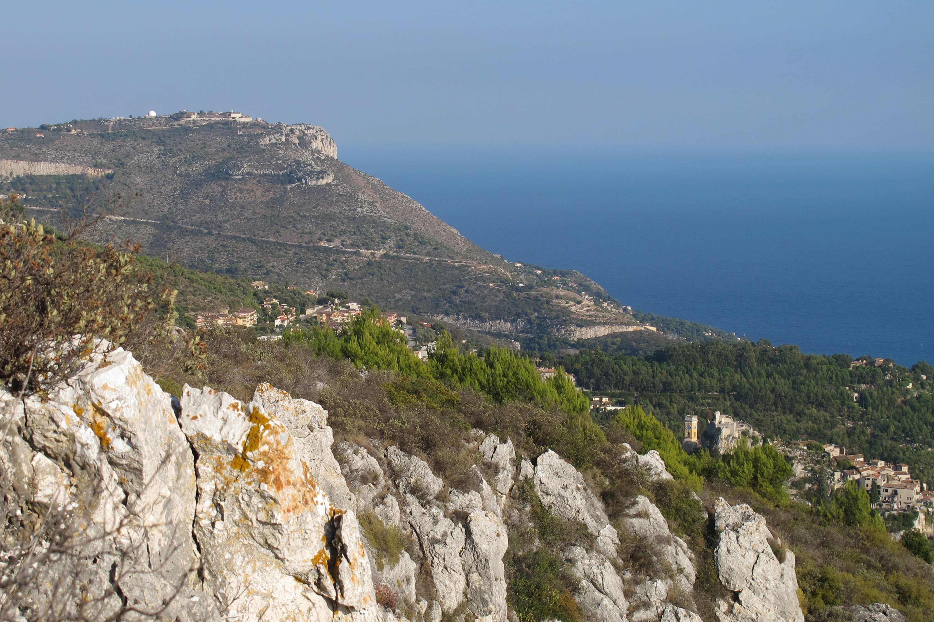 Vue du col d'Èze, PACA, France. On aperçois Èze-Village en bas à droite.